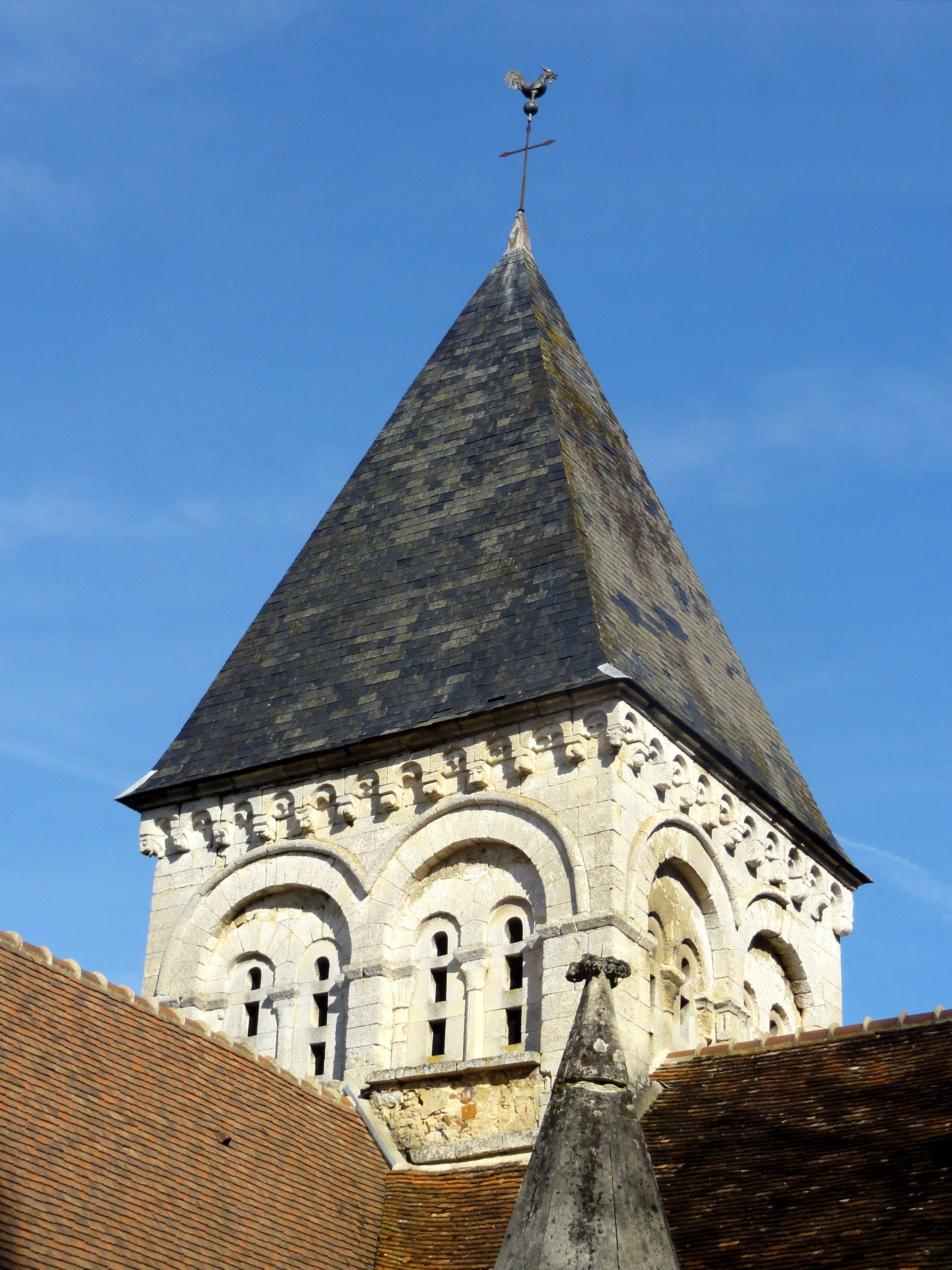 Le clocher.